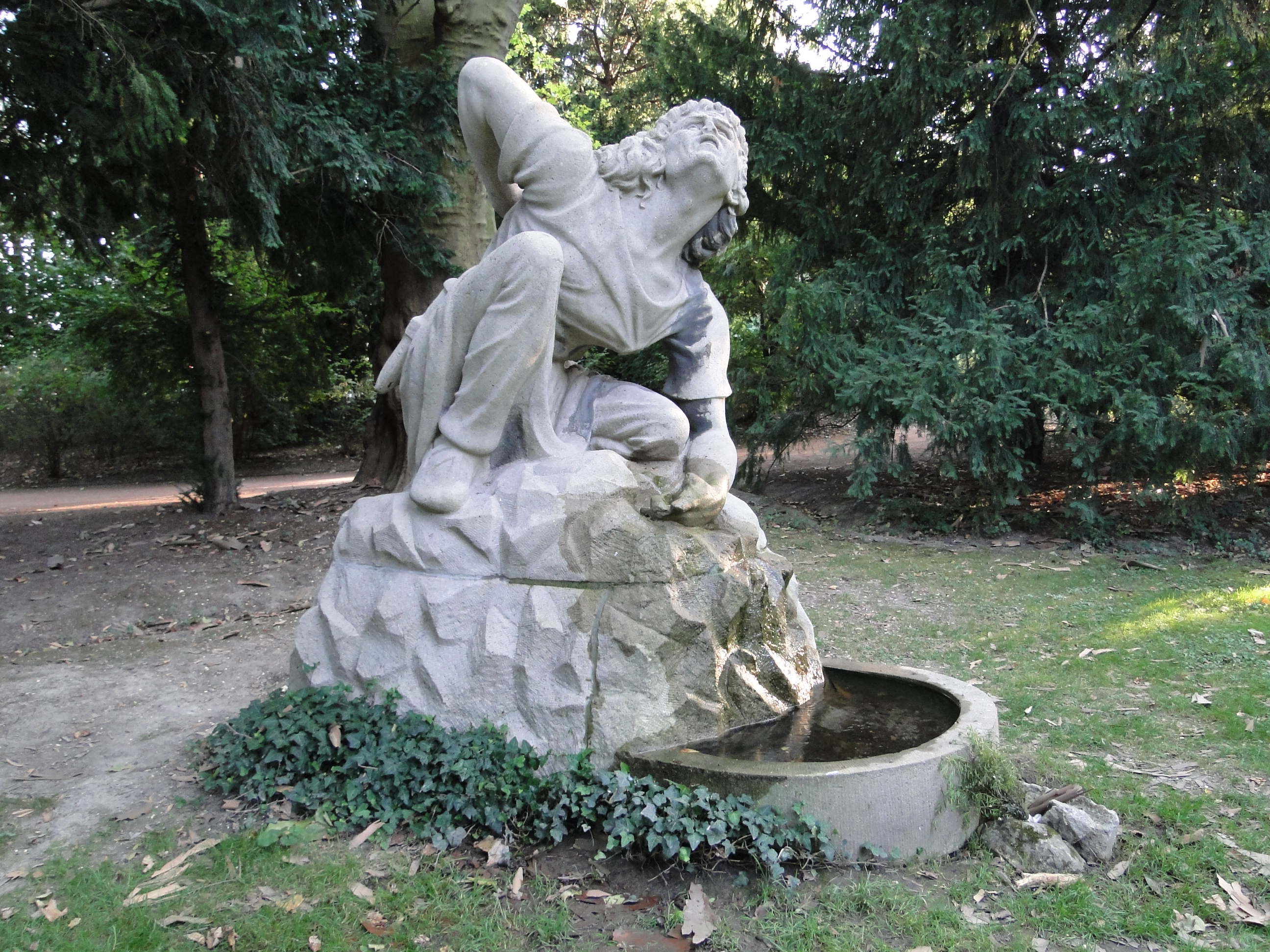 Siegfriedbrunnen im Lennépark in Dresden